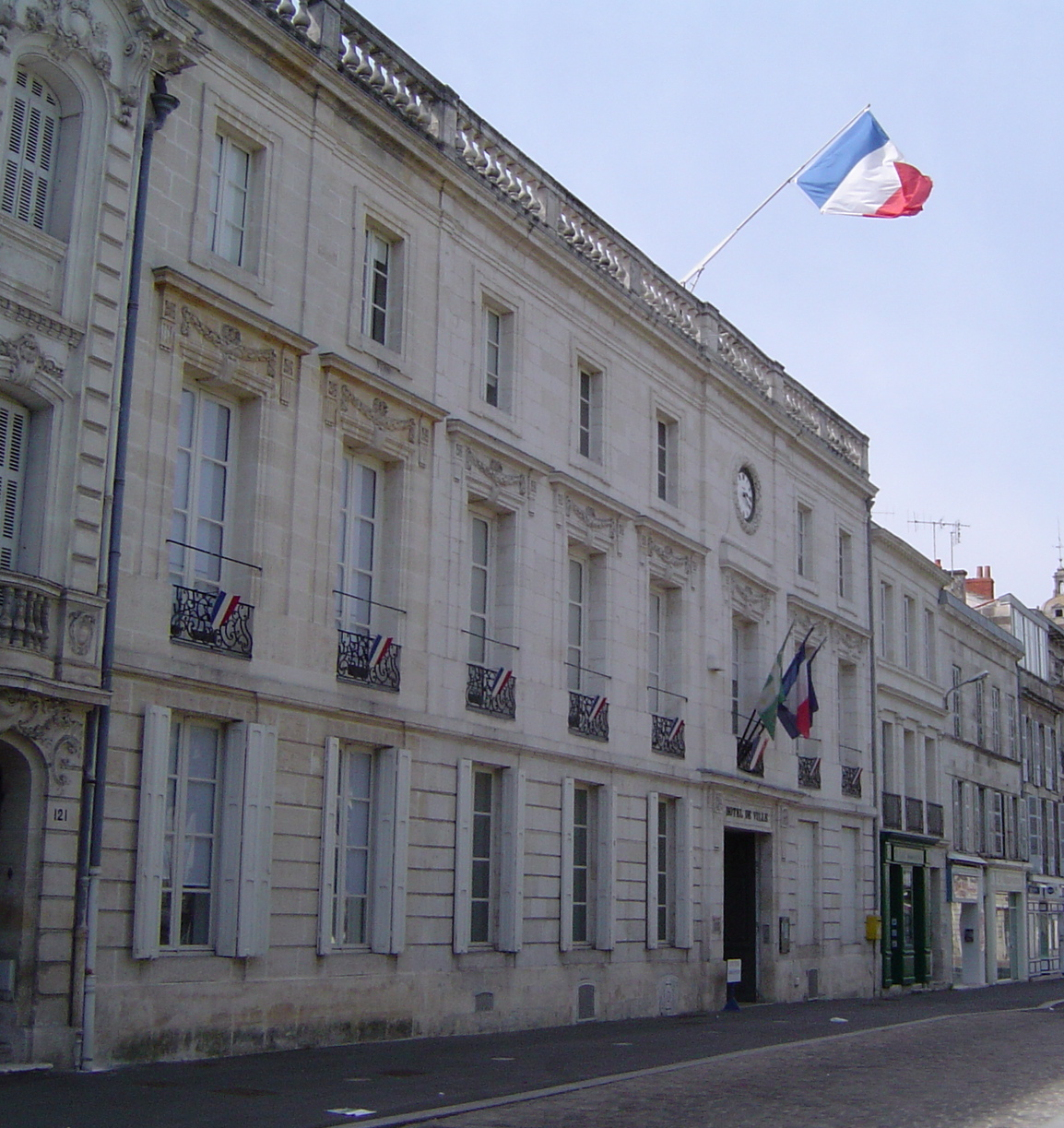 Façade de l'hôtel de ville de Rochefort donnant sur la place Colbert